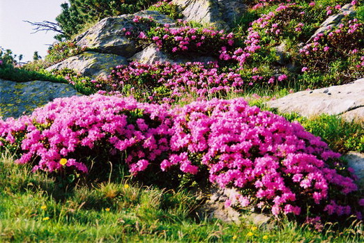 Straturi de flori în rezervaţia ştiinţifică Piatra Rea